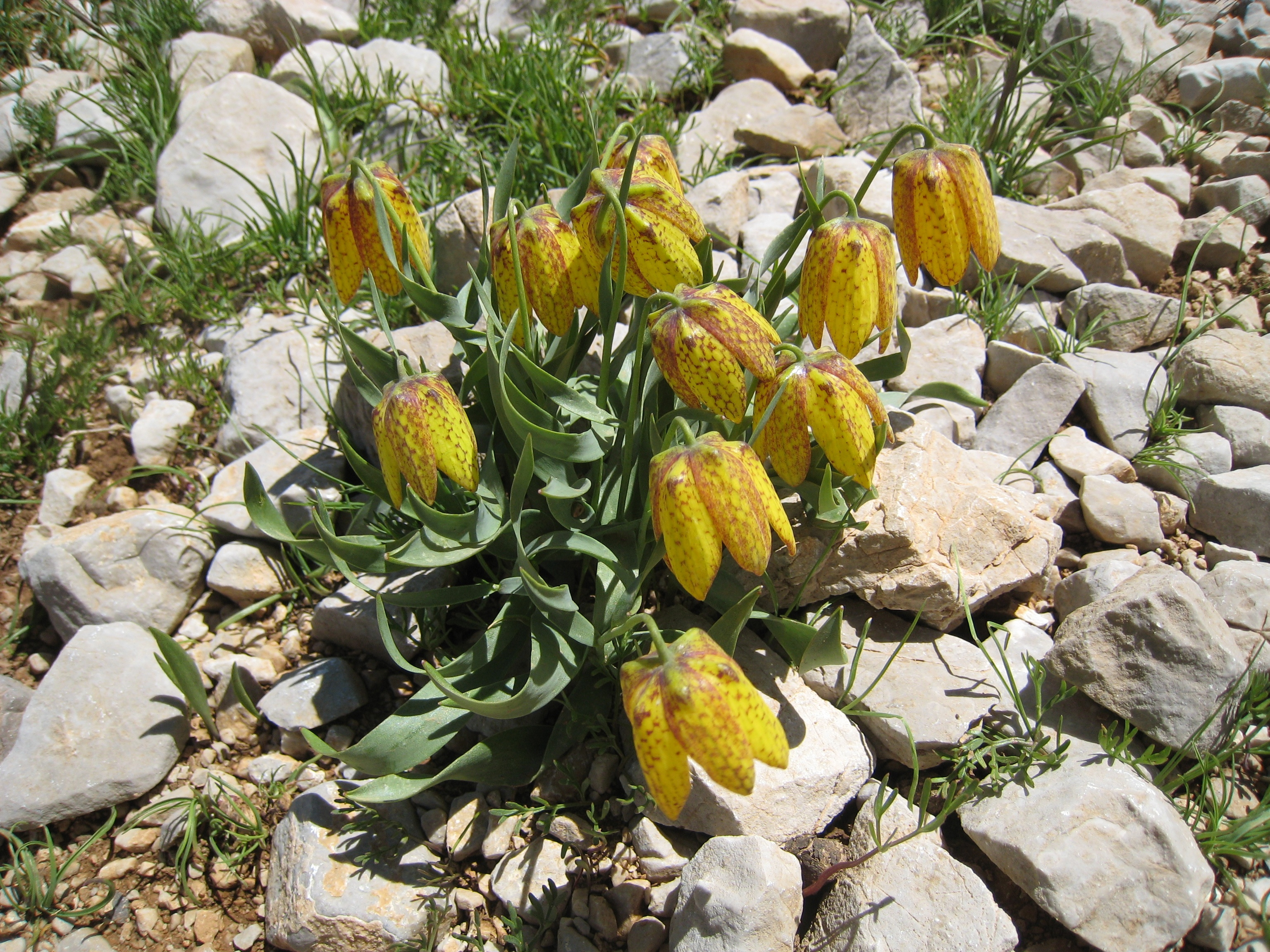 Fritillaria sp., in mountains near Demirkazık, Turkey